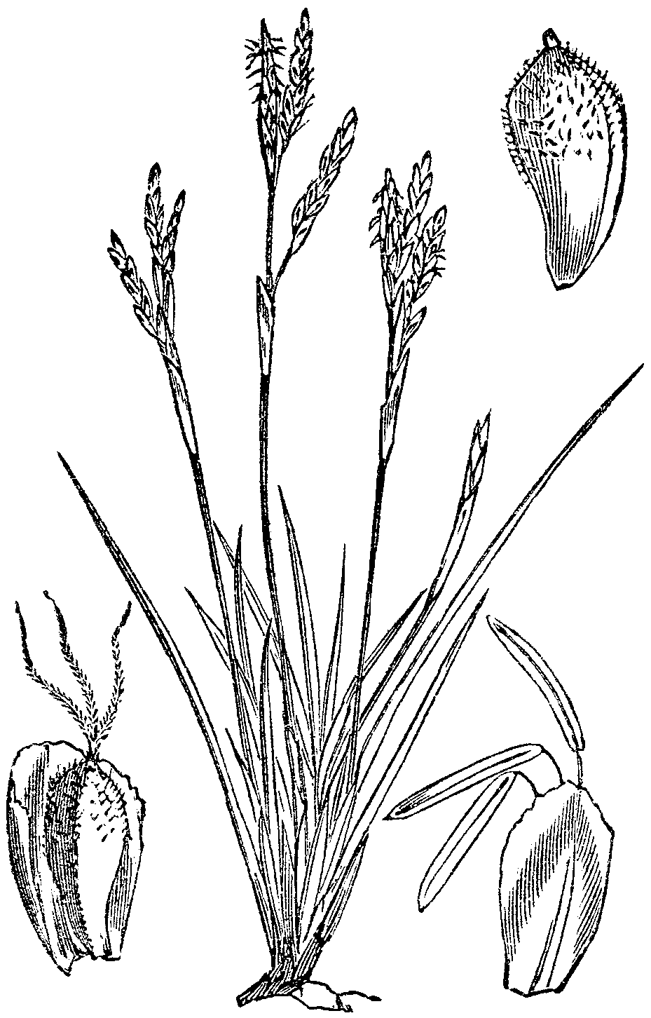 Slika 470. Prstasti šaš [sic!]. (Cárex ornithópoda.)